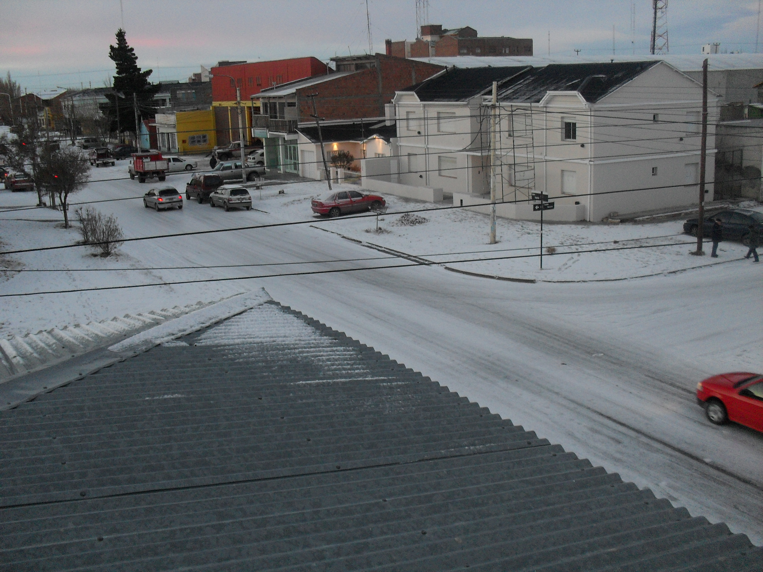 Nevada en Río Gallegos, Provincia de Santa Cruz, República Argentina.